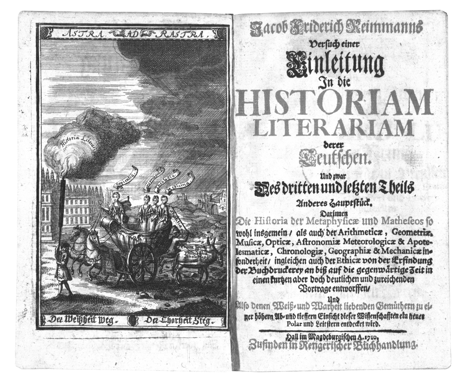 Titelblatt und Frontispiz des Bandes 3.2 von Jacob Friedrich Reimmanns Versuch einer Einleitung in die Historiam Literariam (Halle: Renegerische Buchhandlung, 1710).